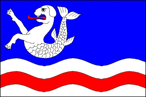 Vlajka obce Lukavice (okres Chrudim)